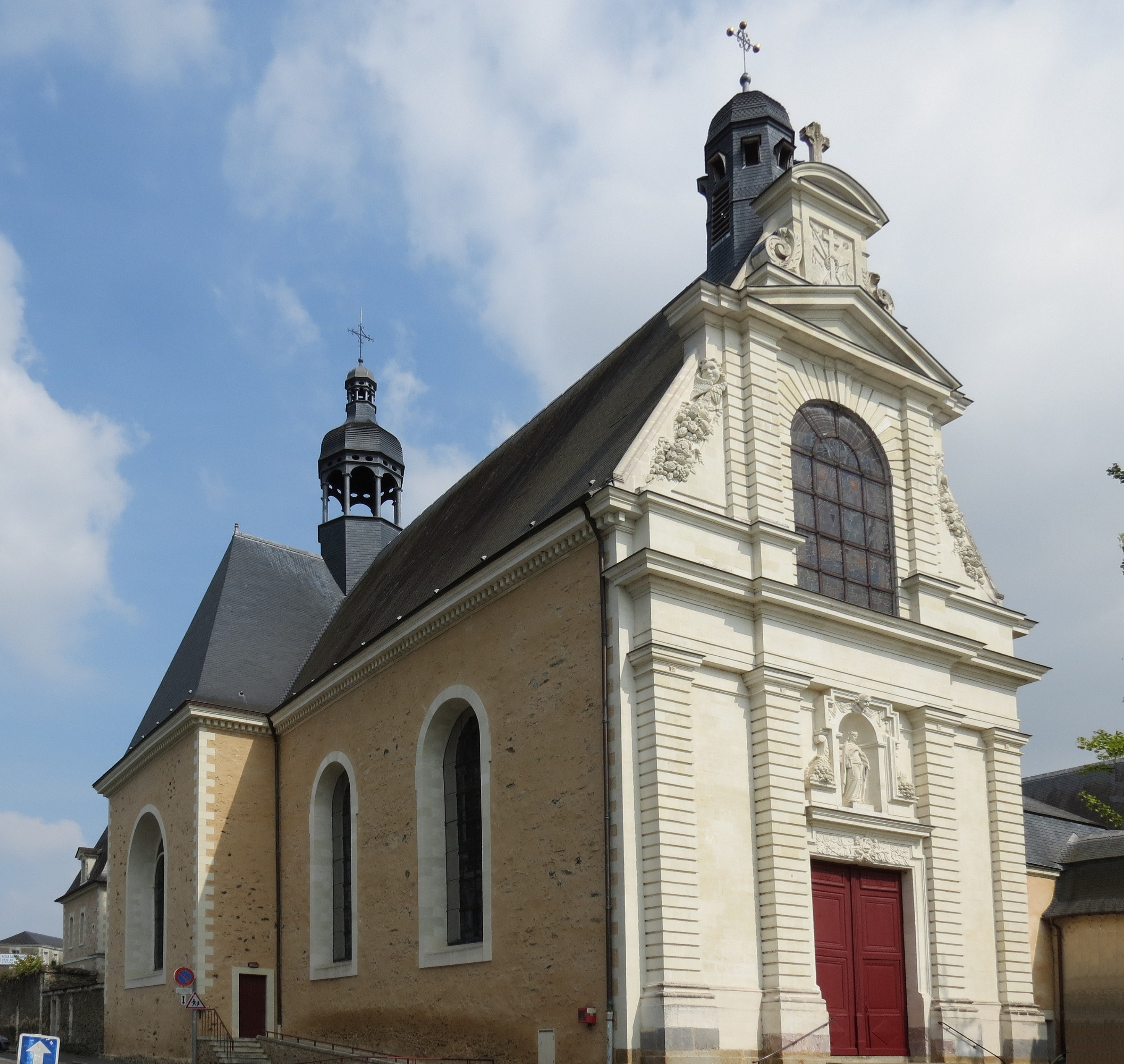 Église de la Trinité, Château-Gontier, Mayenne.